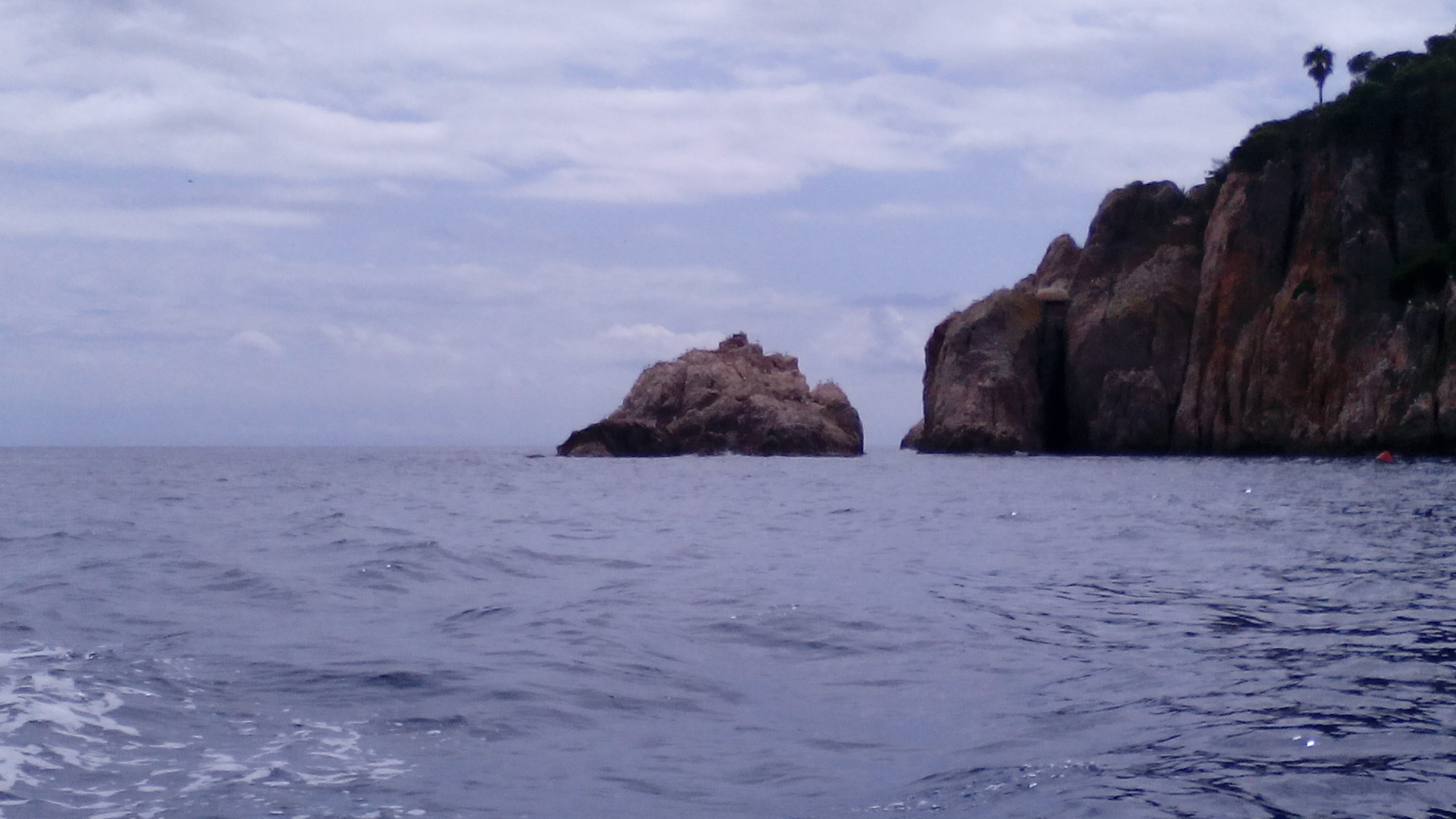 Illot des Freu (Sant Feliu de Guíxols).